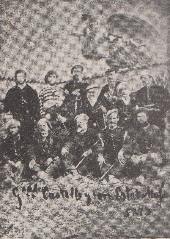 Gral. Castells y son Estat Major (1873)